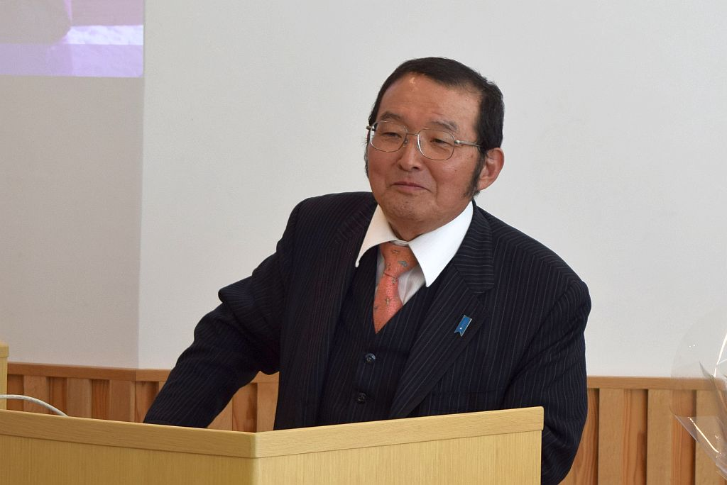 宮塚コリア研究所講演会で講演する宮塚利雄